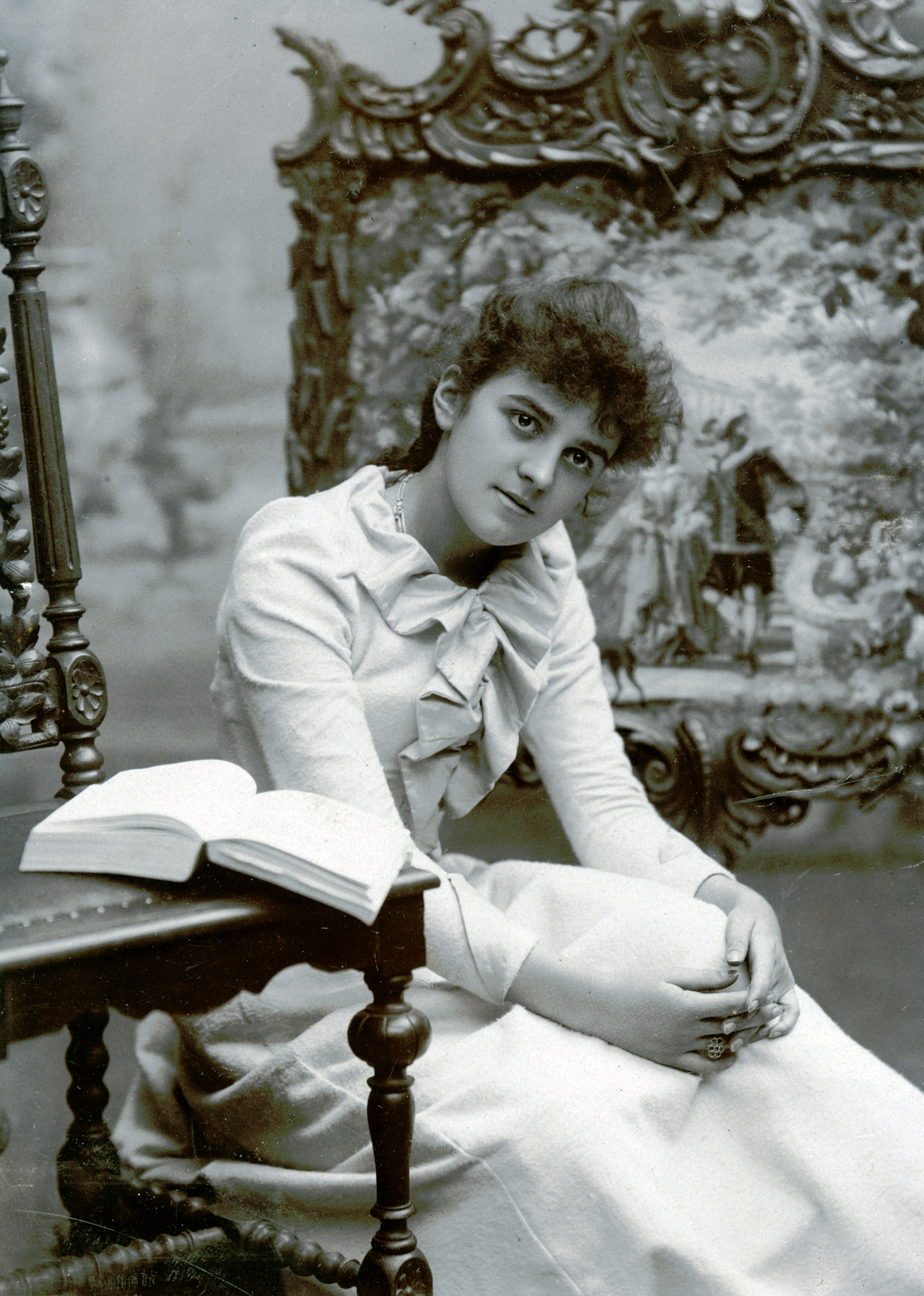 Alma Lund, elev vid Stora teatern i Göteborg 1890-91